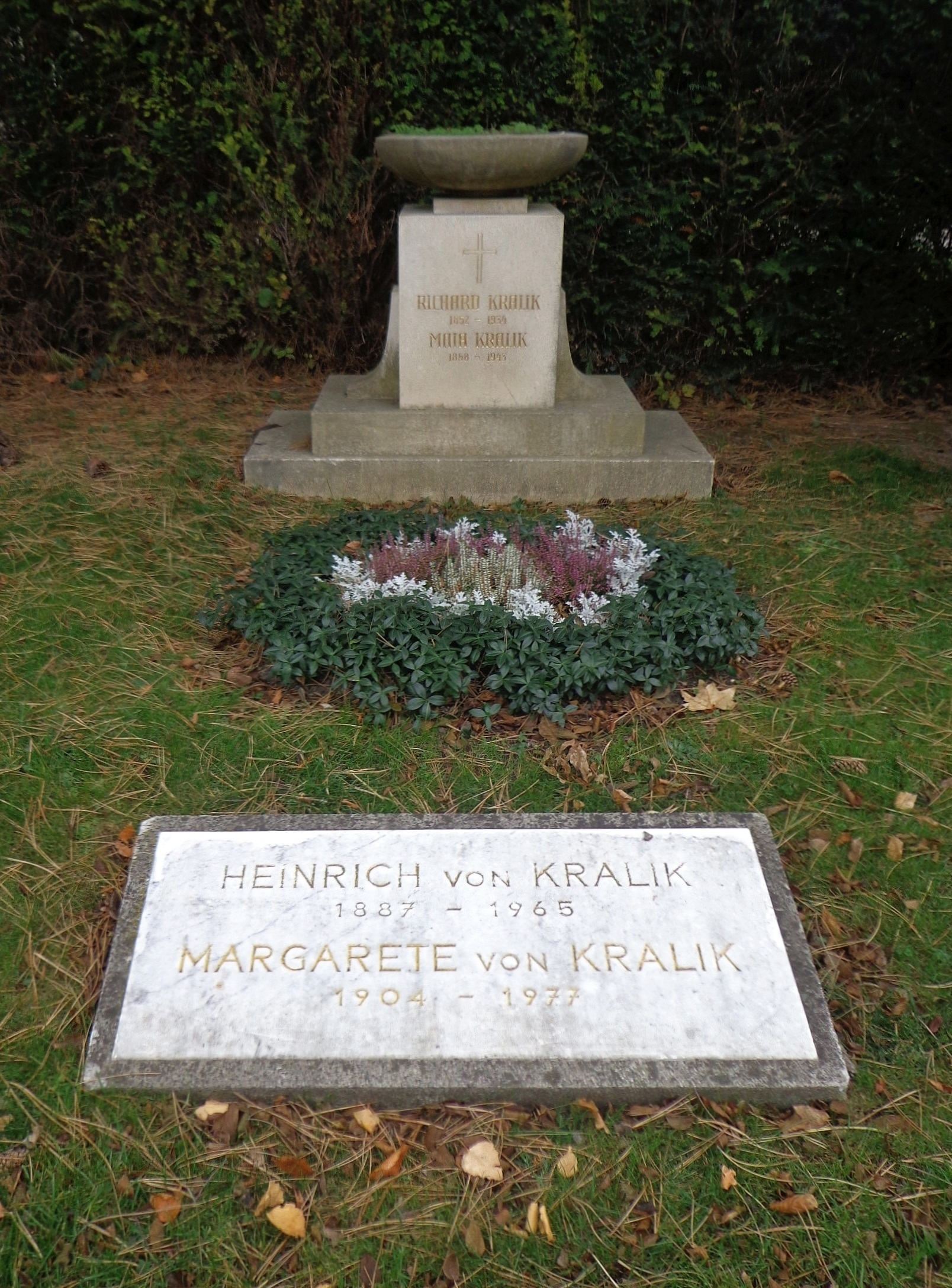 Wiener Zentralfriedhof - Gruppe 14 C, Ehrengrab von Richard und Heinrich von Kralik